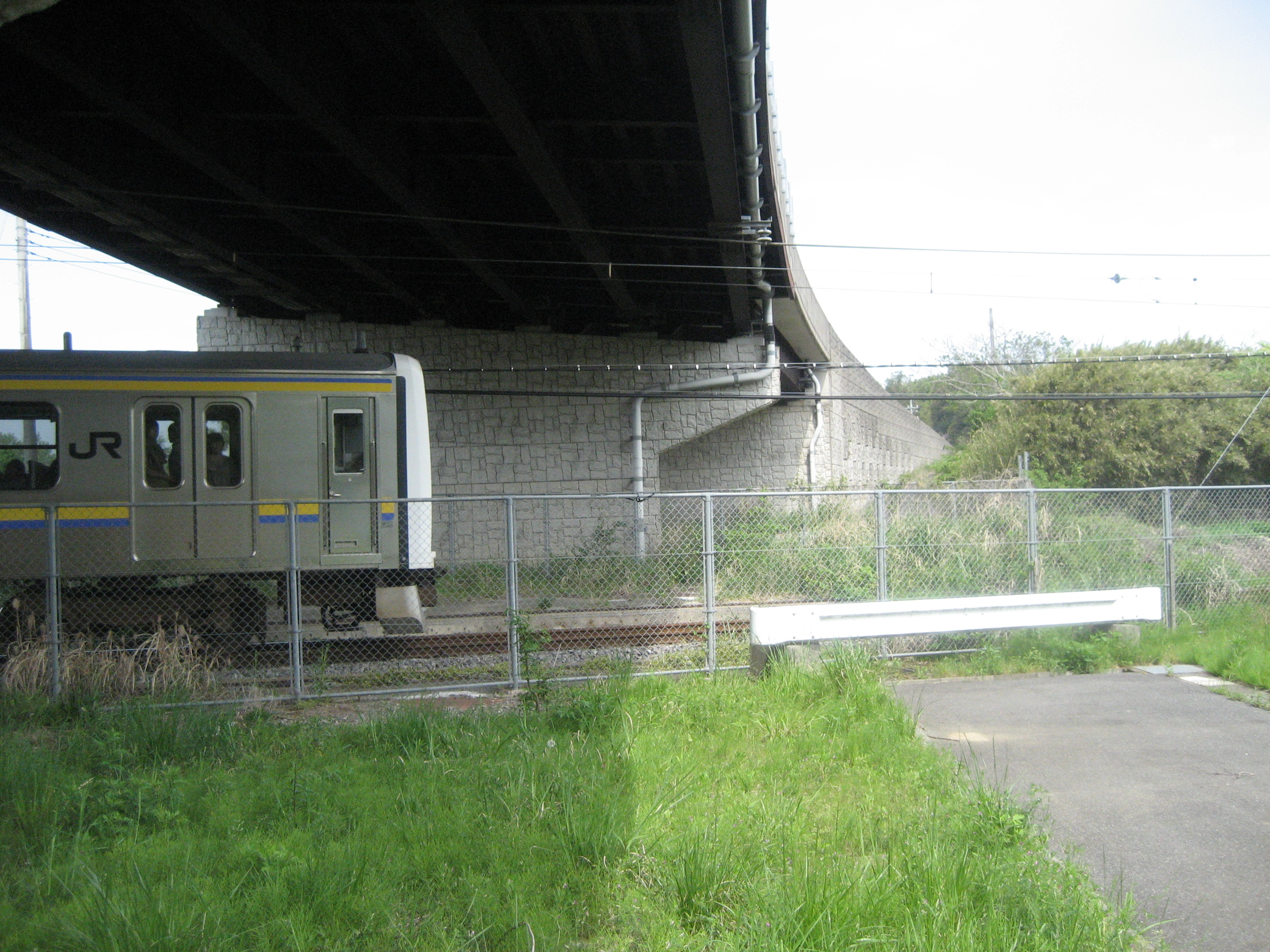 千葉県道103号線成田市大菅跨線橋とJR成田線との交差部分（踏切跡が見える位置で撮影）